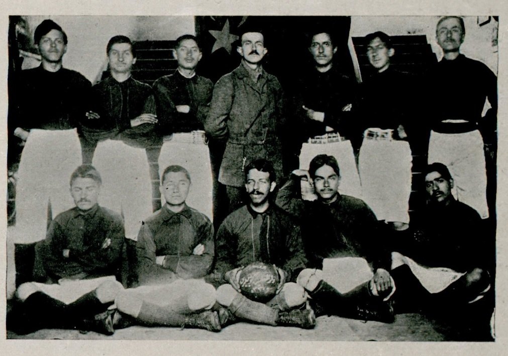 "Bursa Darülmuallimini Birinci Futbol Takımı. Fotoğraftaki duranların ortasındaki zat Bursa Darülmuallimin müdürü iken ahiren İzmir Darülmuallimin müdürlüğüne tahvil edilen Edhem Nejad Beydir."